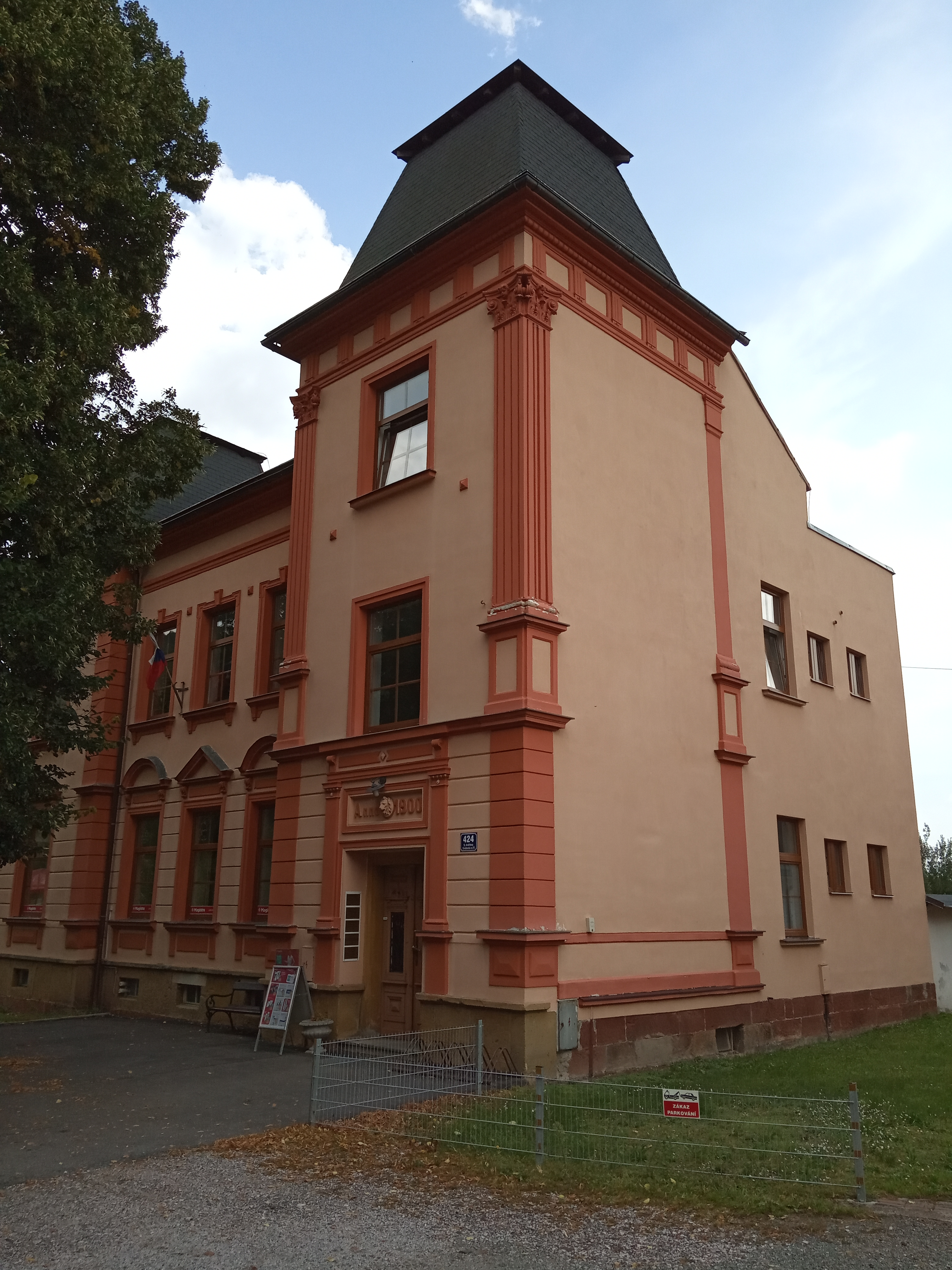 Svoboda na Úpou - 5. května 424